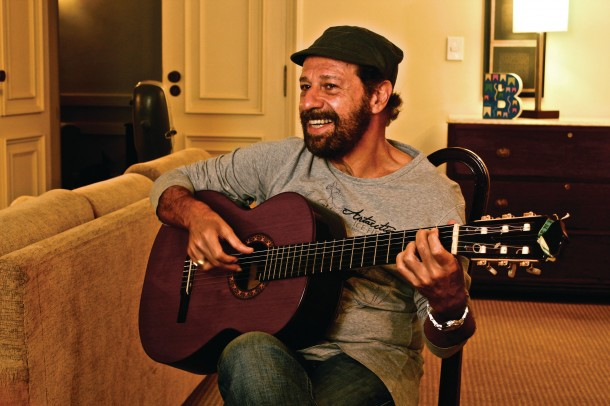 Músico brasileiro João Bosco em imagem do acervo da TV Brasil.